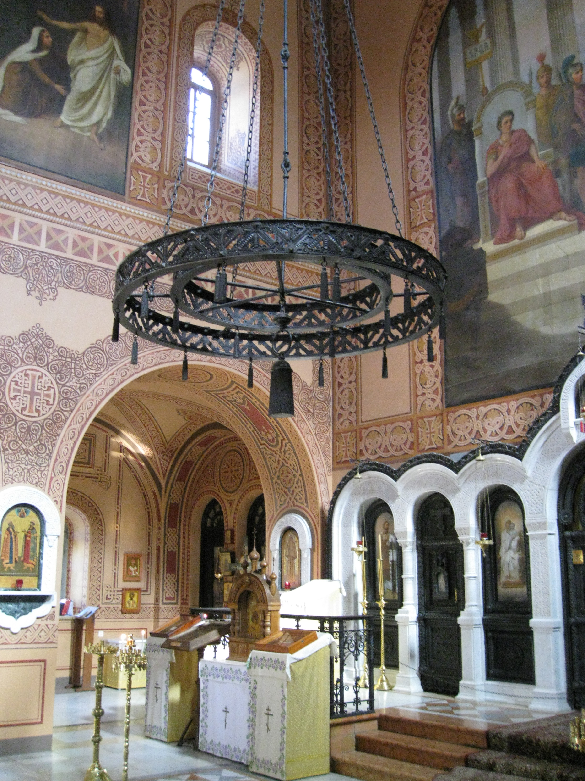 Jerusalem, Israel Jerusalem